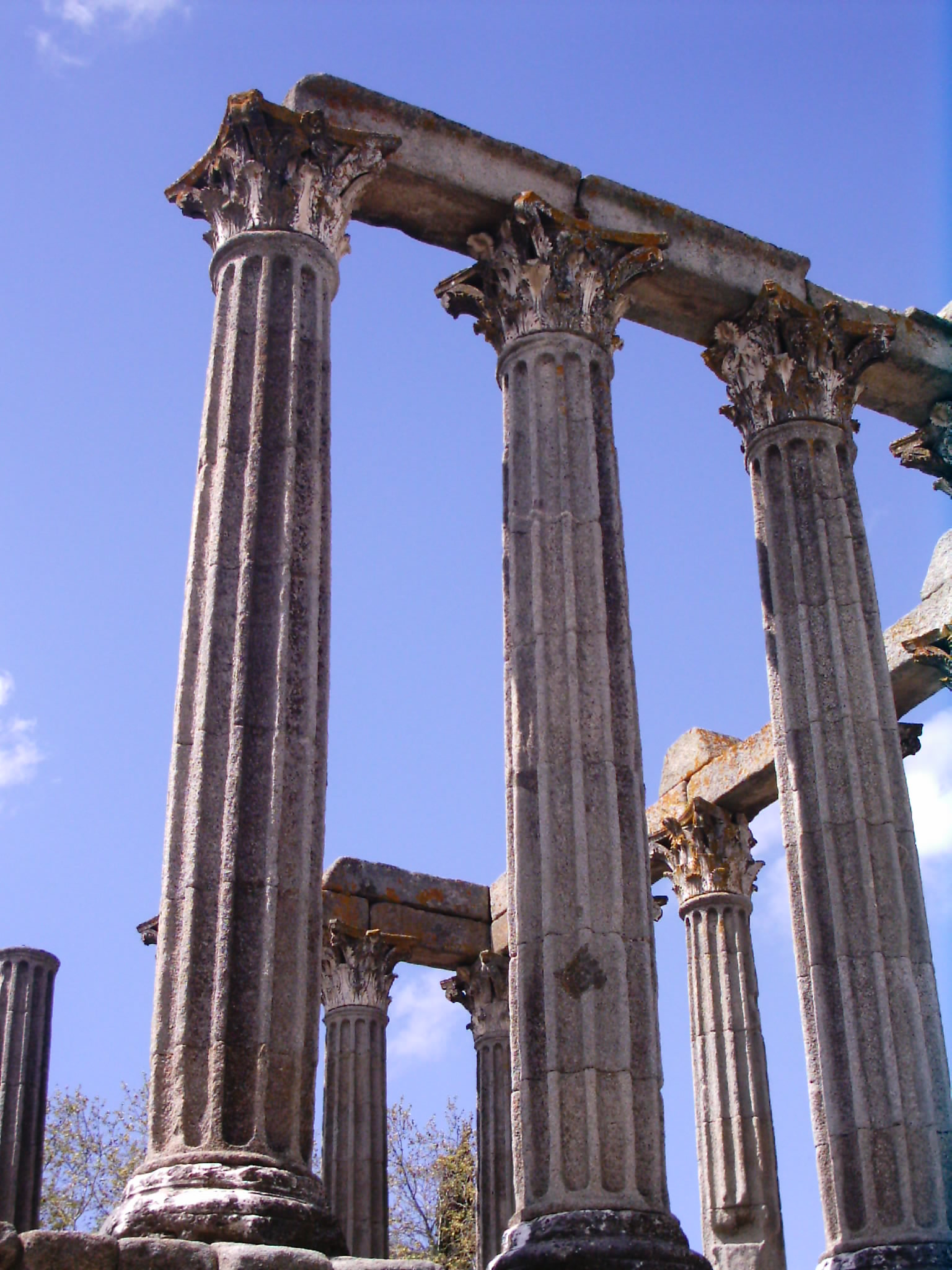 Vista do Templo romano de Évora, Évora, Portugal.